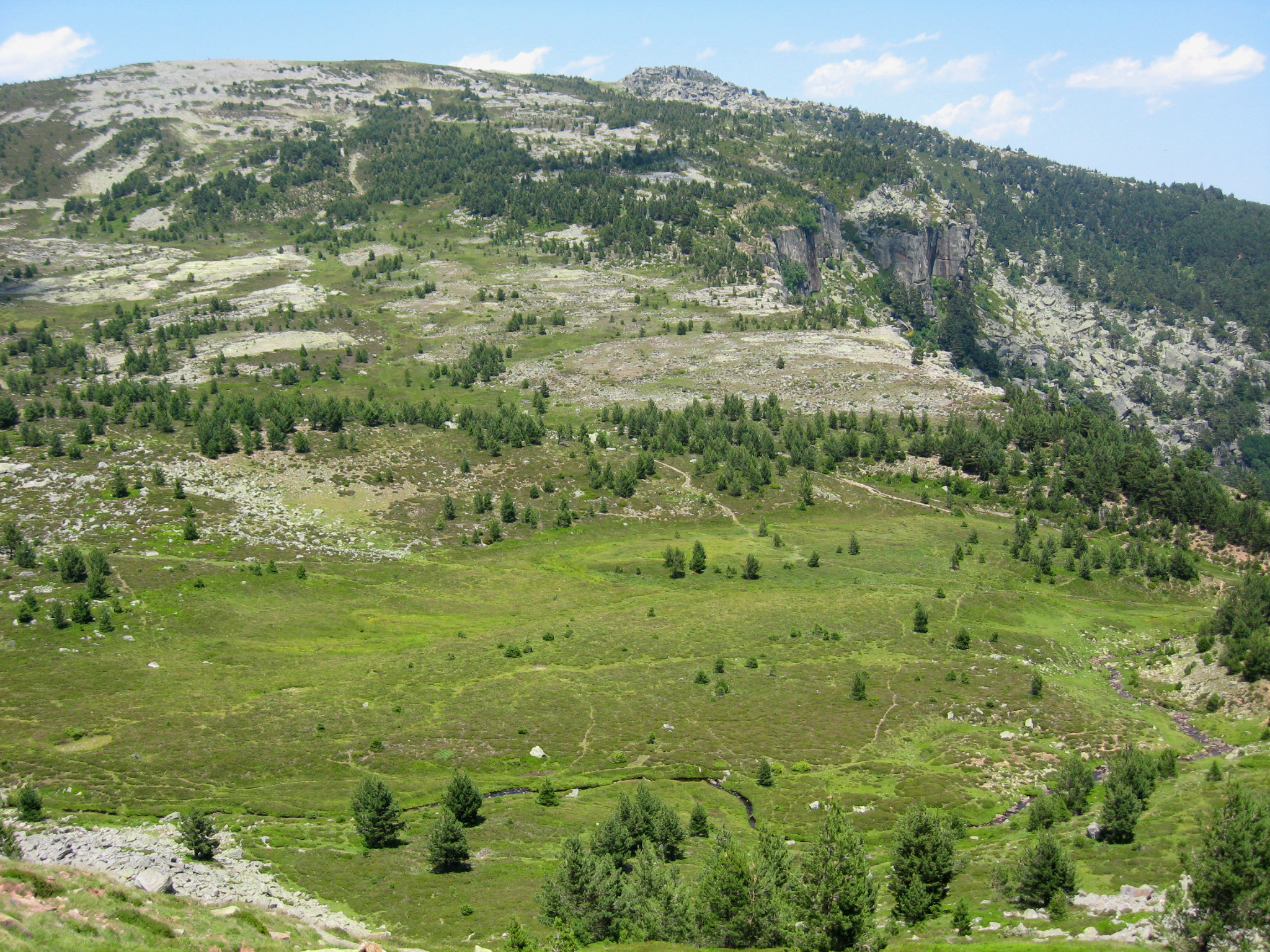 Sierras de Urbión y Cebollera This is a photography of a Site of Community Importance in Spain with the ID: ES4170116. Natura2000 entry, EEA entry